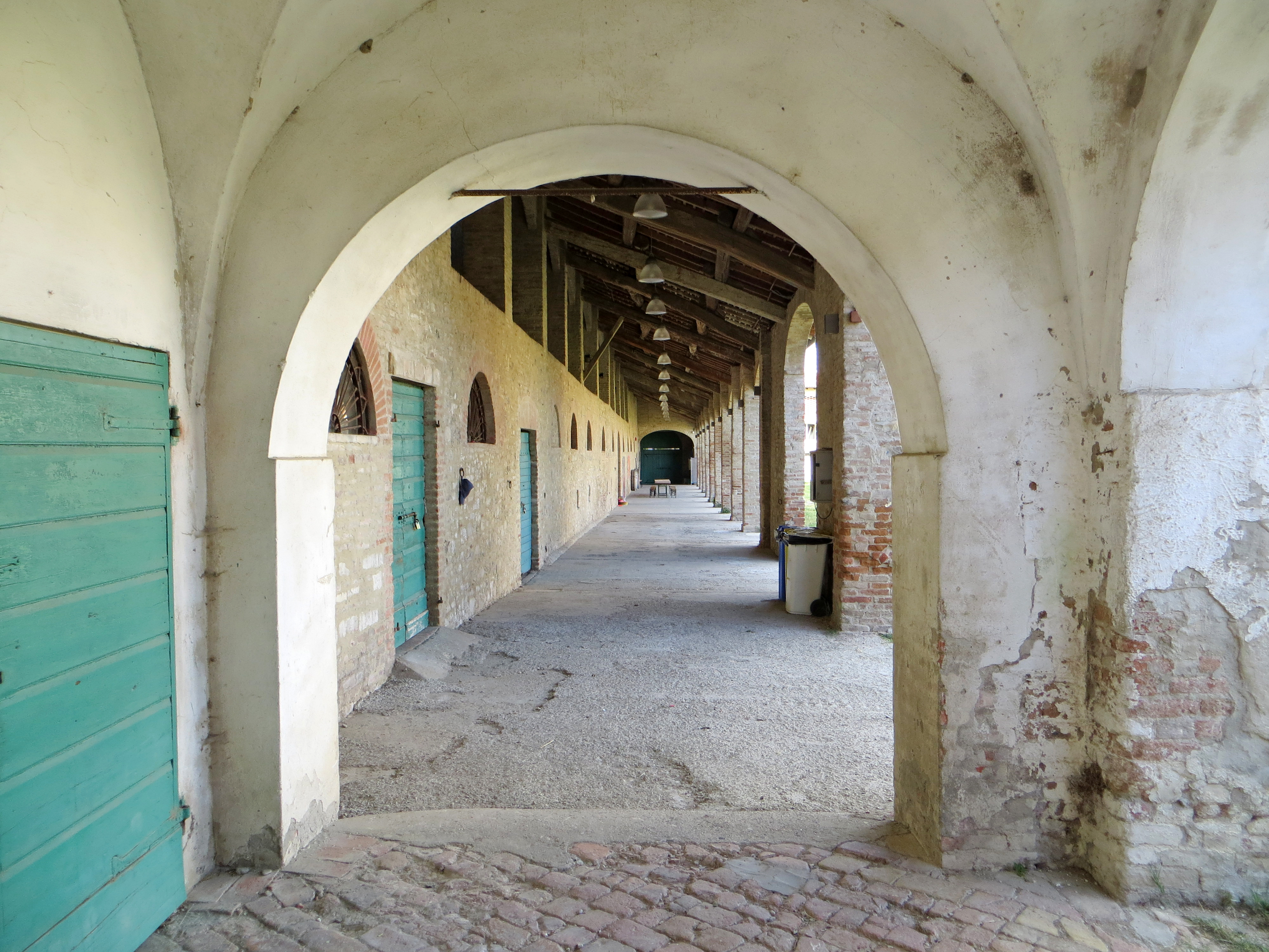 Corte di Giarola (Collecchio) - porticato dell'ala ovest